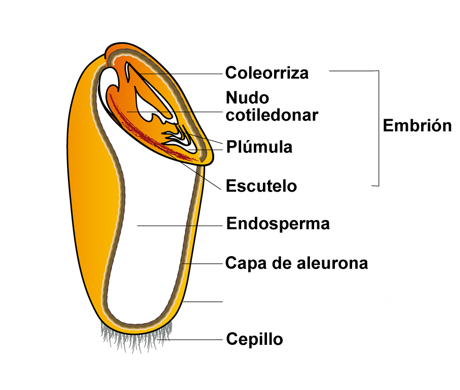 Esquema del fruto de las poáceas (original en alemán aquí